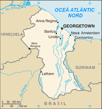 Mapa polític de Guyana de la CIA World Factbook.